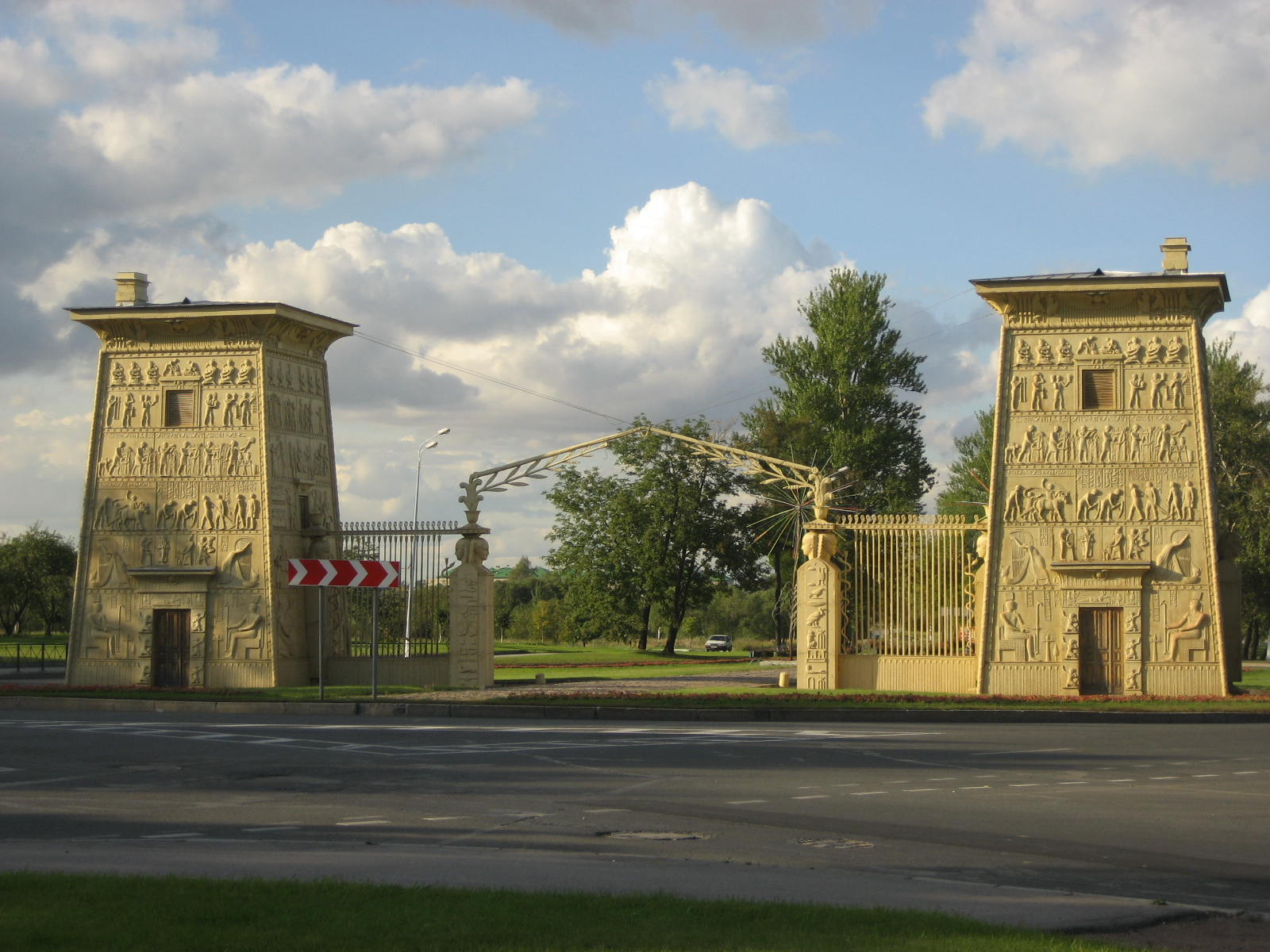 Ворота Египетские: Петербургске шоссе, Октябрьский бульвар, Пушкин, Пушкинский район, Санкт-Петербург